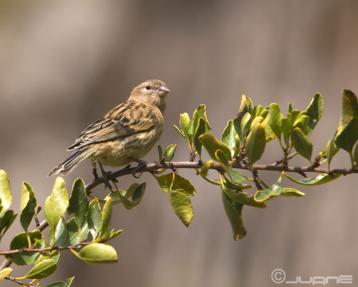 Canario silvestre, (Serinus canarius) joven